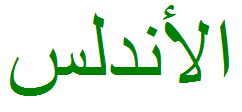 Al-Ándalus en árabe